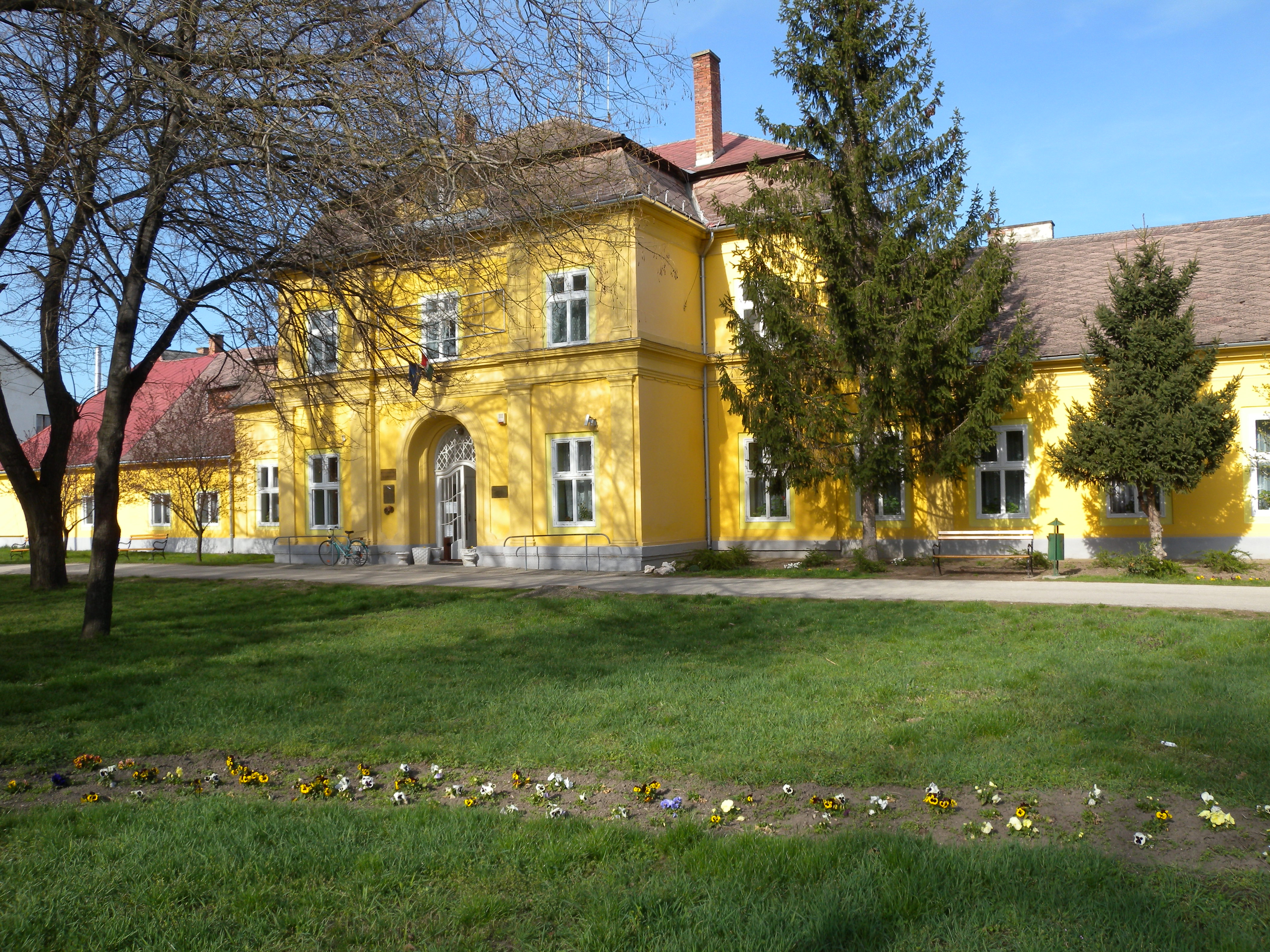 Művelődési ház (Volt Esterházy - Zichy kastély), Ács